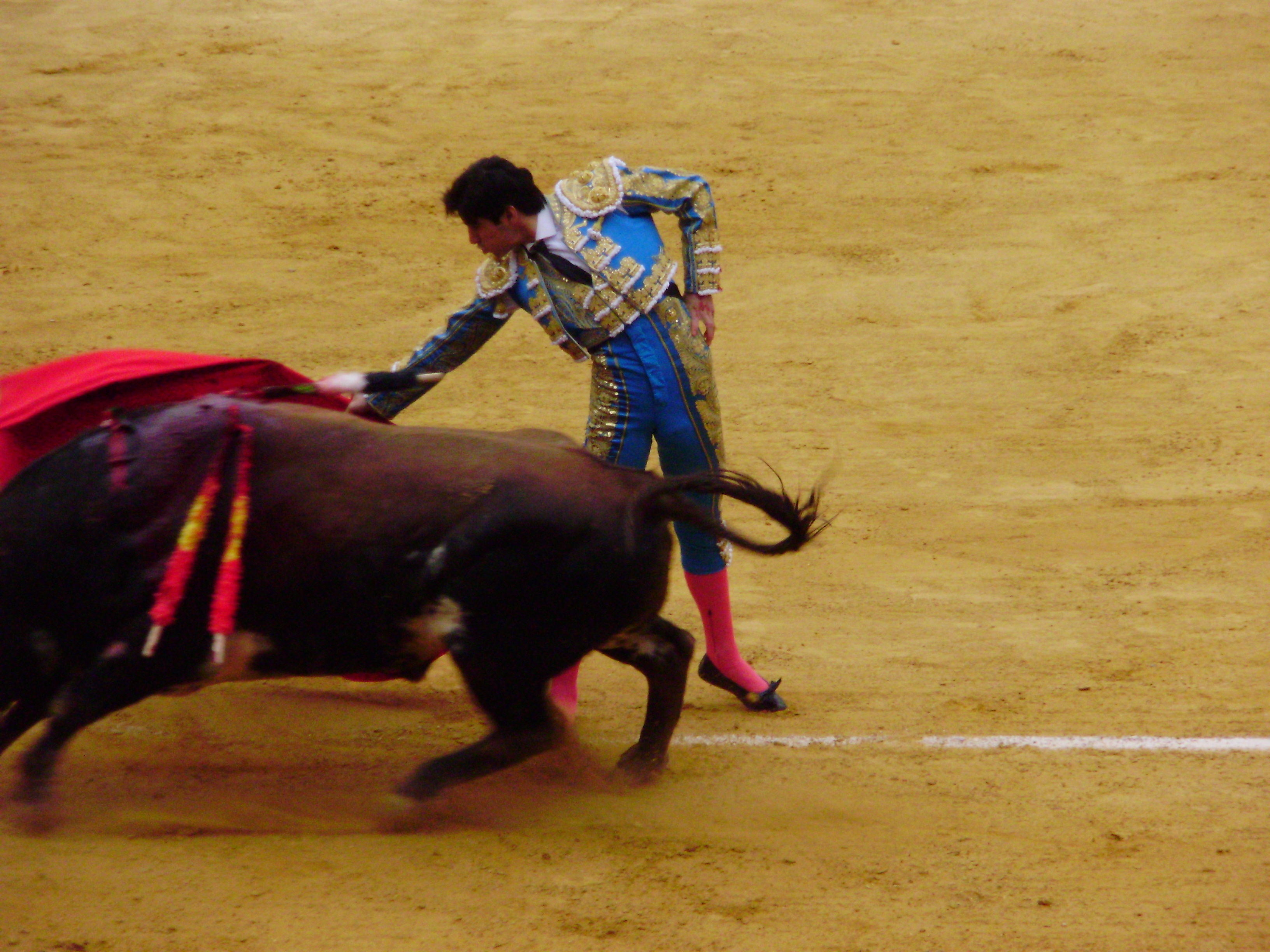 Viernes 5 de septiembre de 2008: Toros de El Ventorrillo para El Juli, José María Manzanares y Miguel Angel Perera